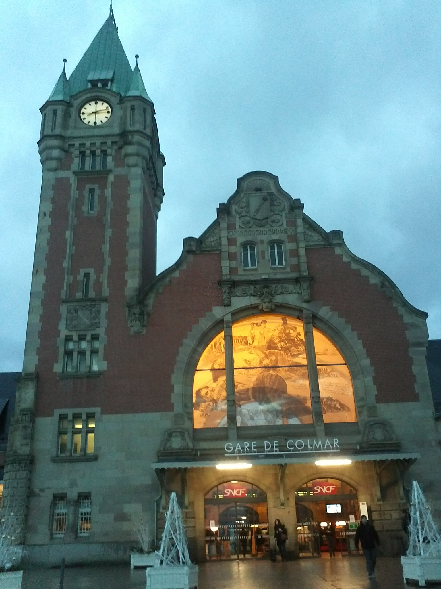 科尔马站，位于法国东部城市科尔马